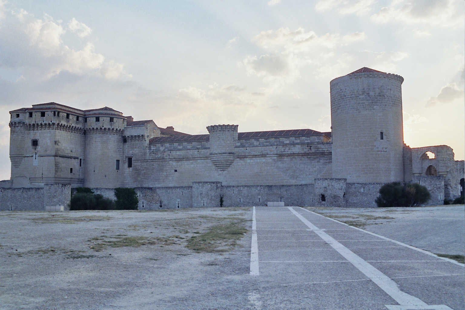 Segovia. (Castilla-León. España) Cuéllar.Castillo palacio de D. Beltrán de la Cueva. Fotografia realizada el 23 agosto de 2002 por el autor. User:Pelayo2